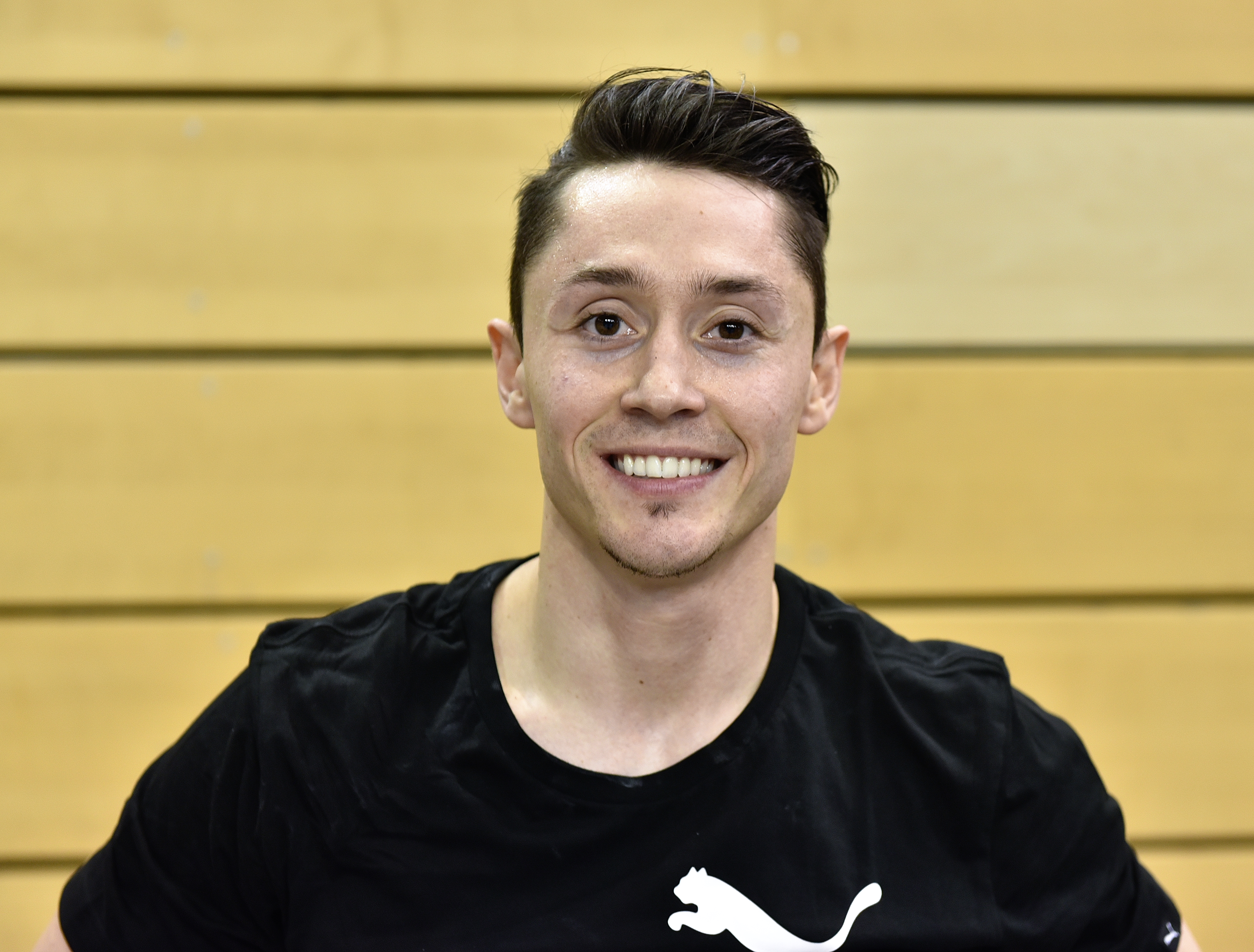 Deutsche Jugendmeisterschaften Gerätturnen männlich AK 13–18 Siegerehrung Gerätefinals beim Internationalen Deutschen Turnfest Berlin 2017. Abgebildet: Andreas Toba.